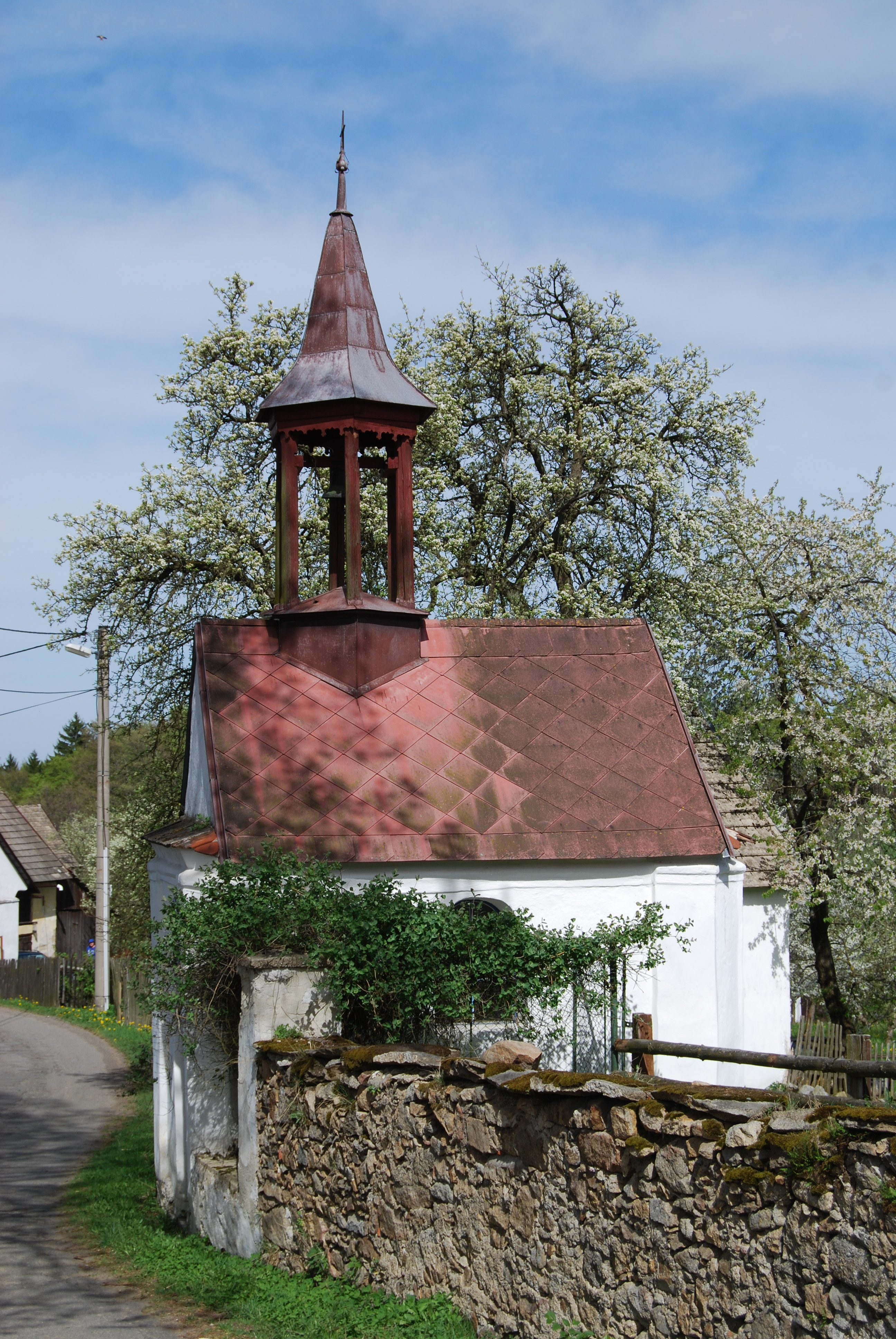 Návesní kaple. Cunkov je malá vesnice, část obce Jistebnice v okrese Tábor. Česká republika.